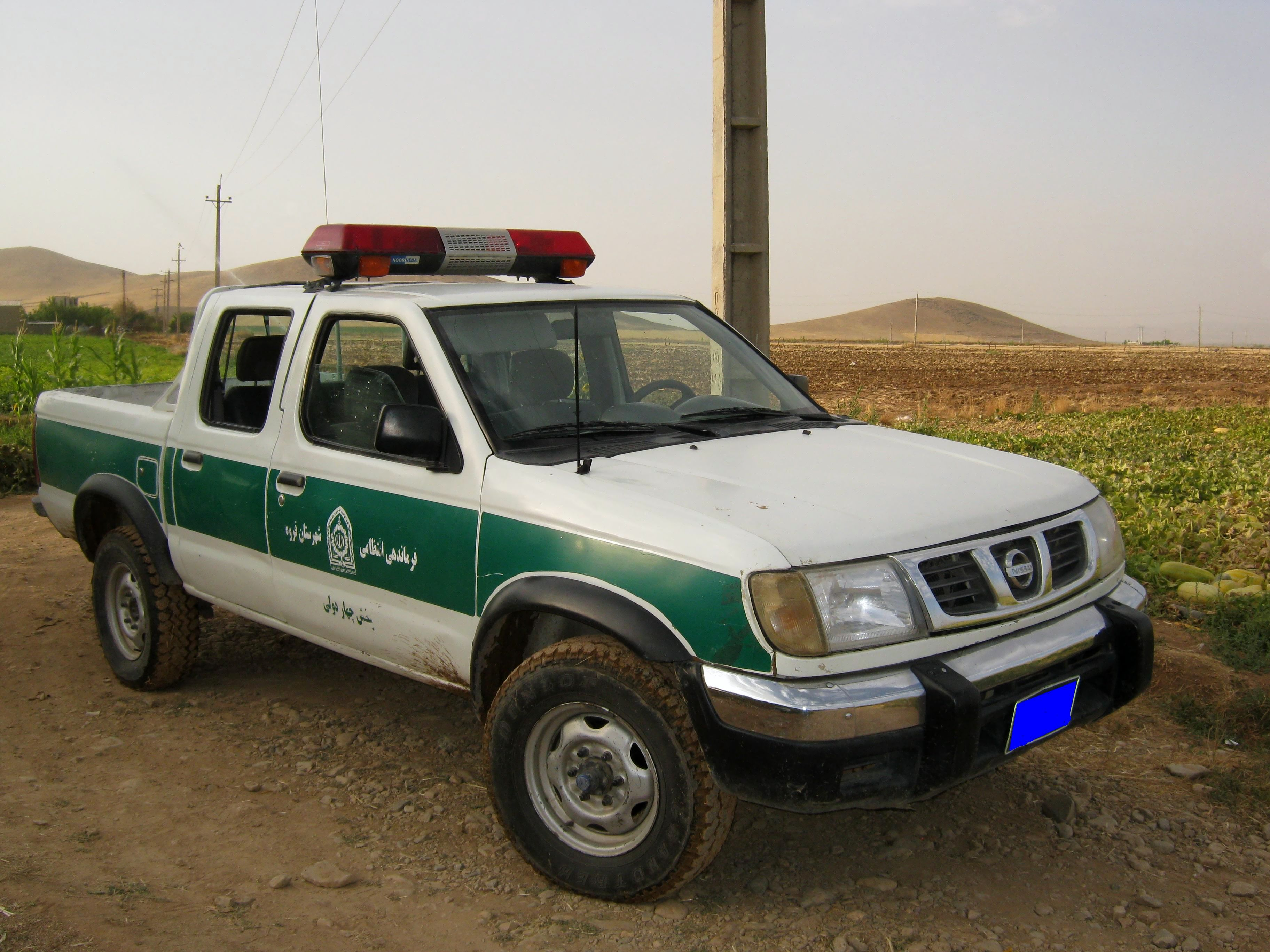 خودروی پلیس گشت ایران